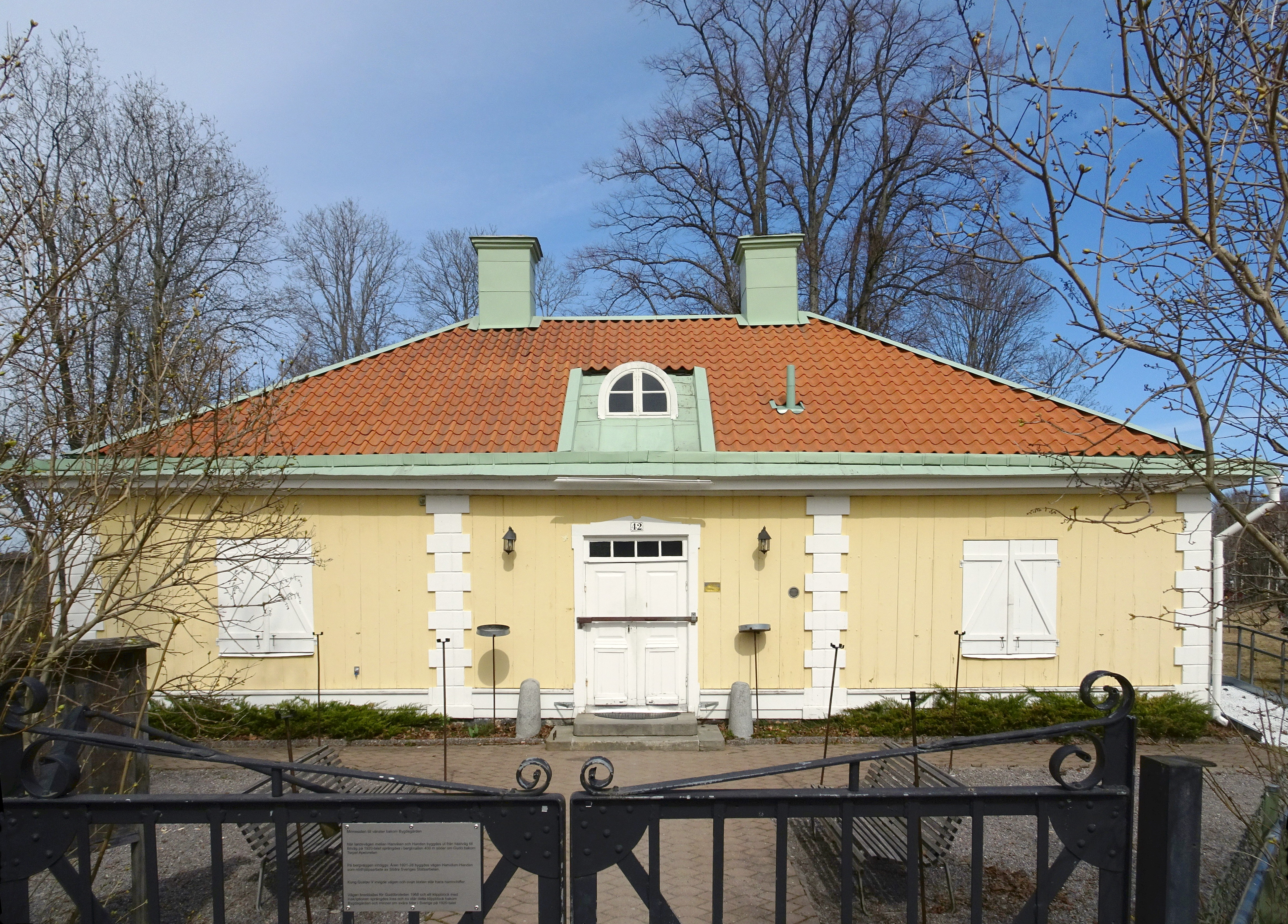 Vendelsö gårds kvarvarande flygel (numera bygdegård)